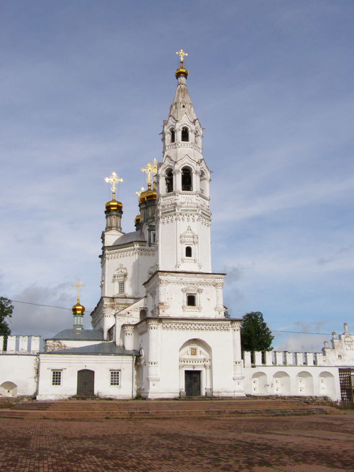 Верхотурский кремль